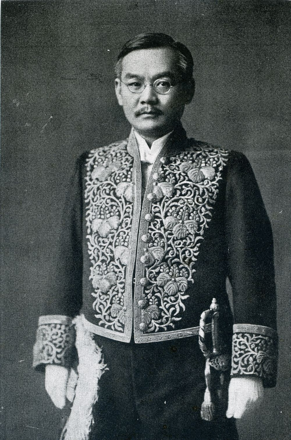 この写真は三木武吉(1884-1956)の1924年のものです。